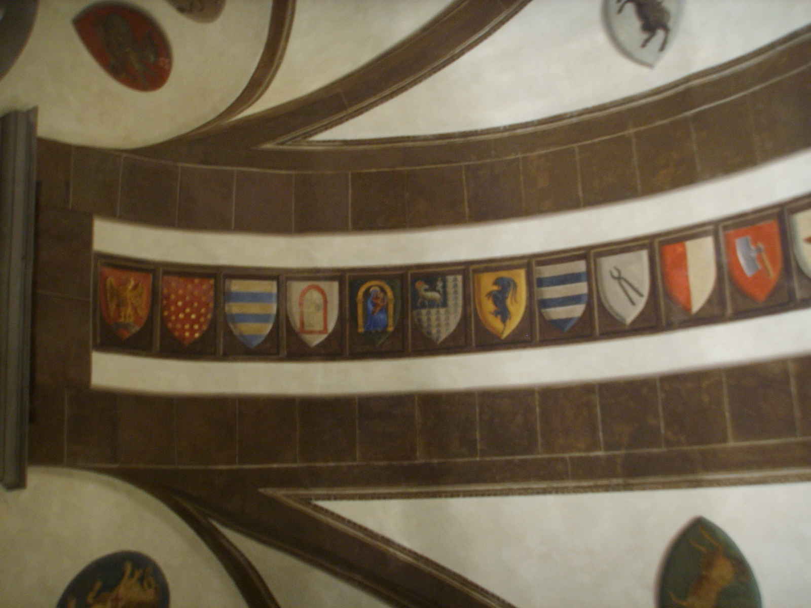 Palazzo Spini Ferroni androne stemmi arti fiorentine